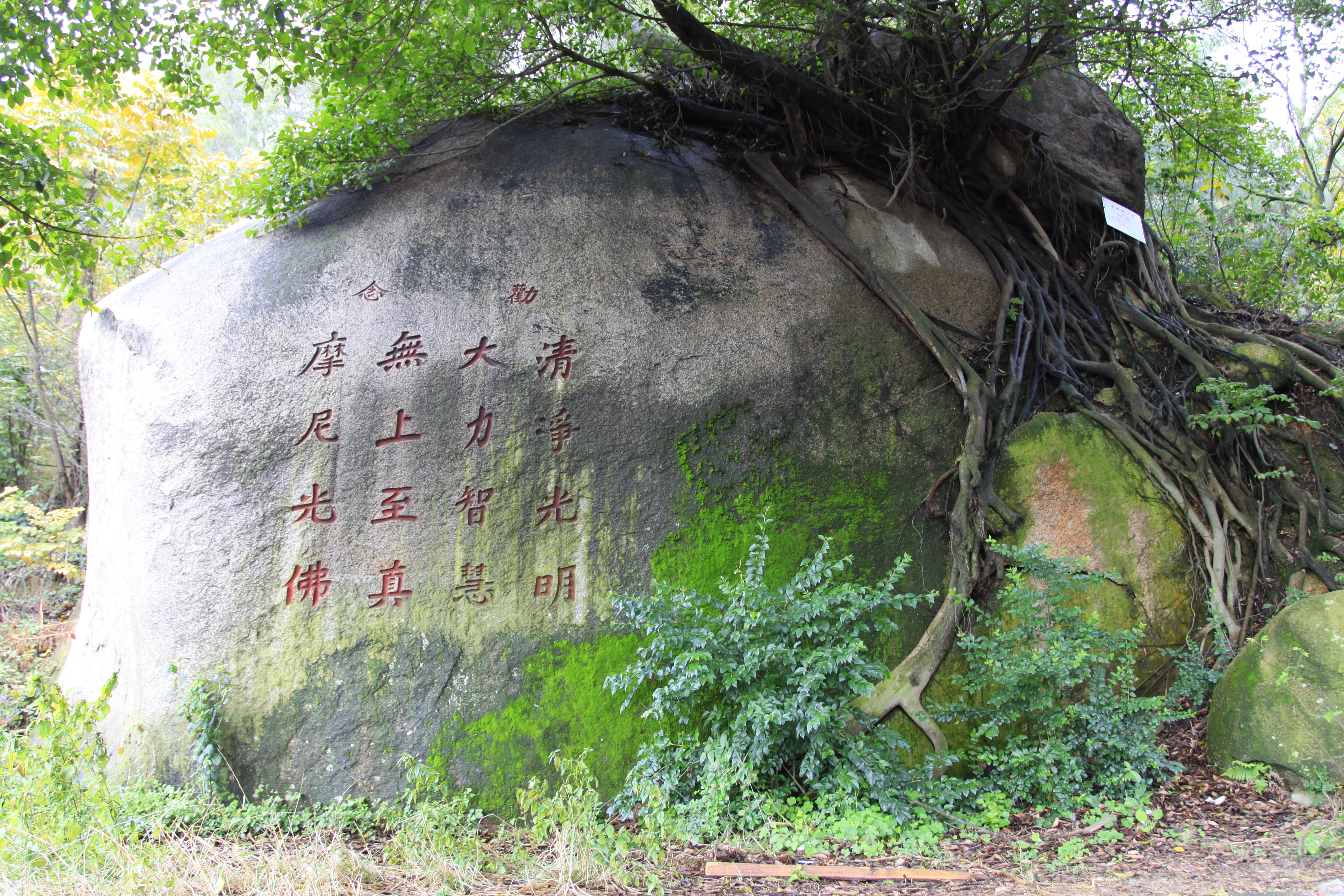 草庵，位于中国福建省晋江市，是全国重点文物保护单位。